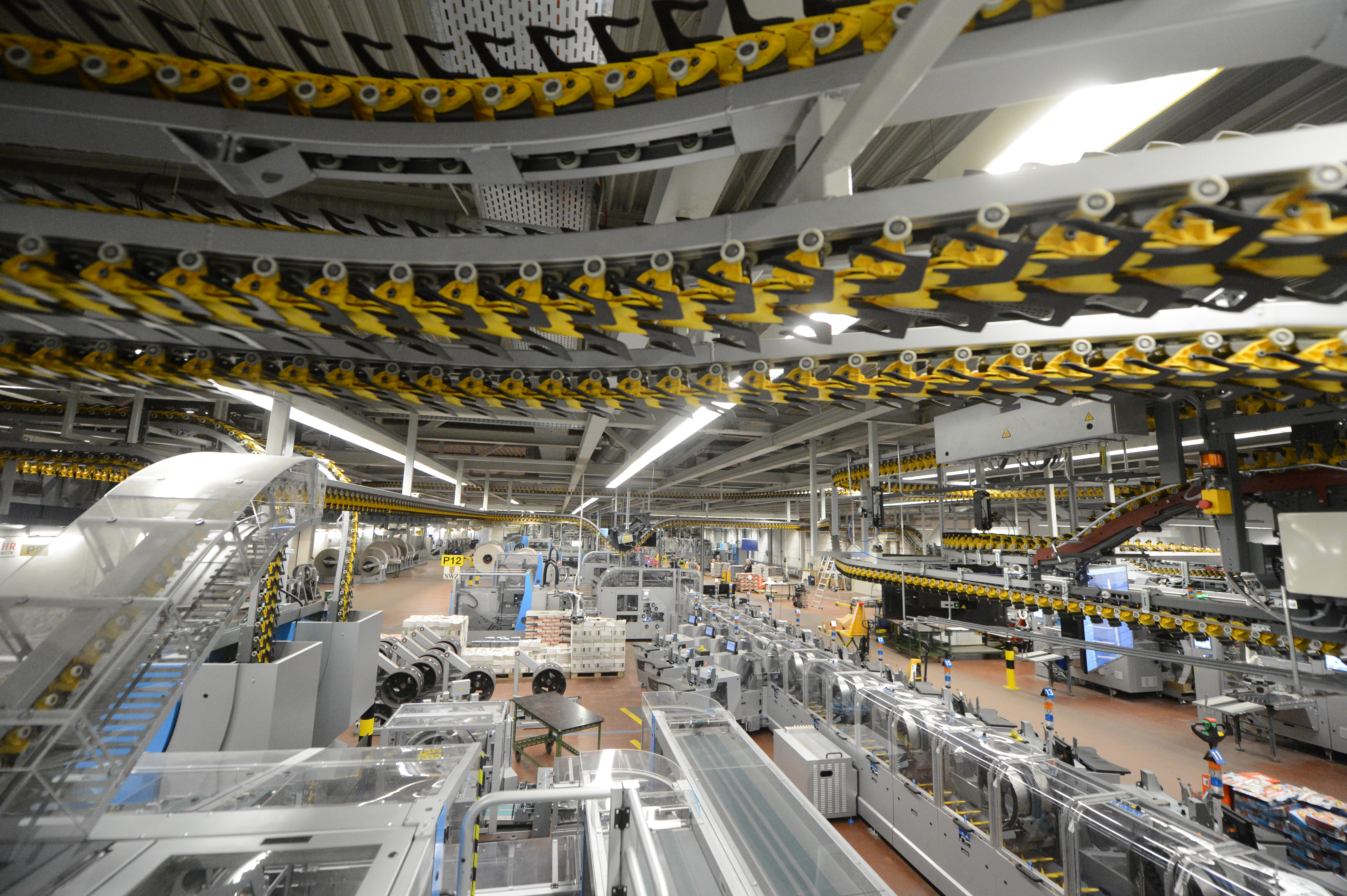 Blick in das Druckhaus von WE-Druck, Oldenburg.